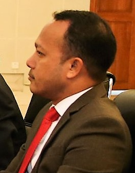 Abel Pires da Silva beim Konsellu Superior Defeza no Seguransa